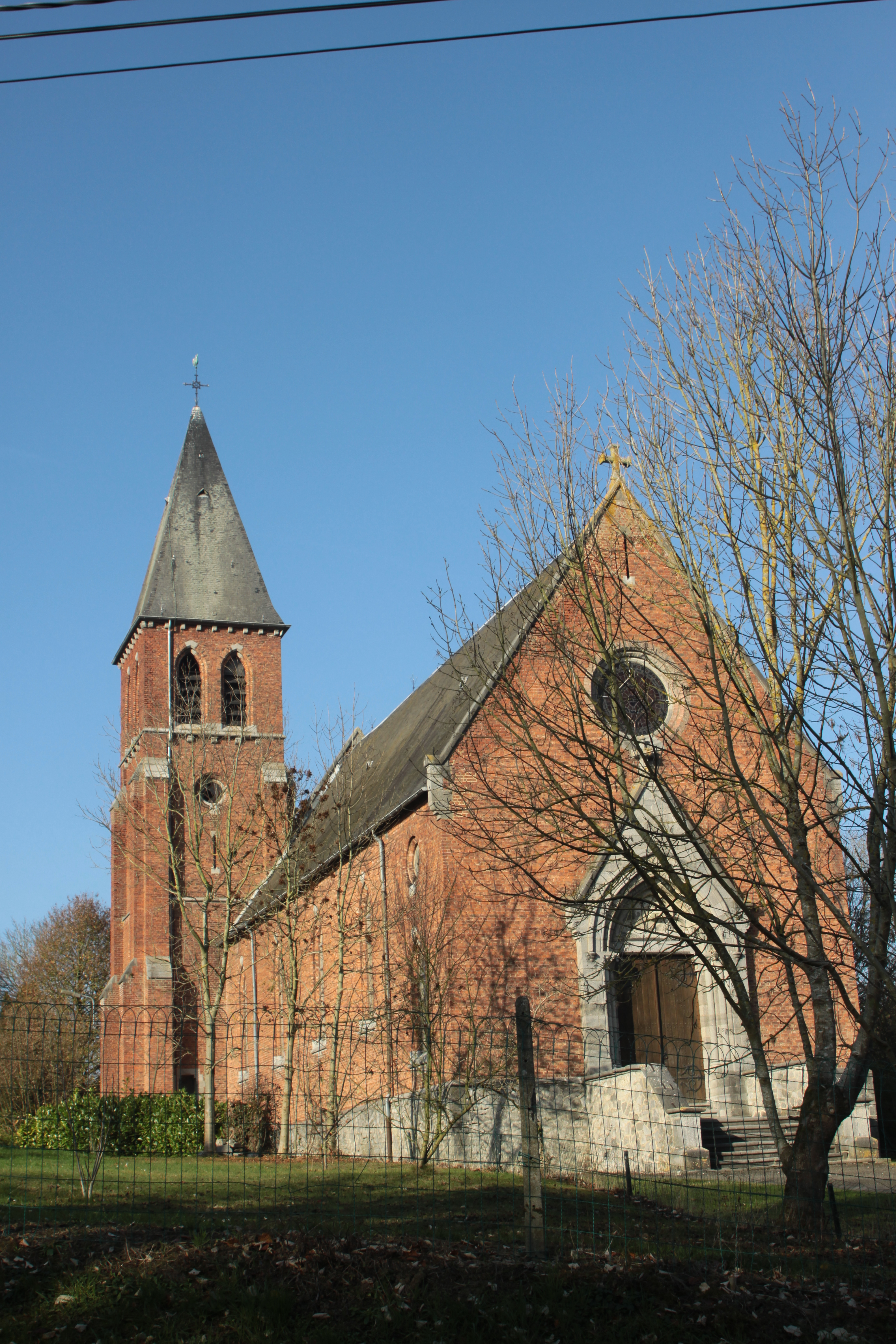 D'Kierch vu Finnevaux